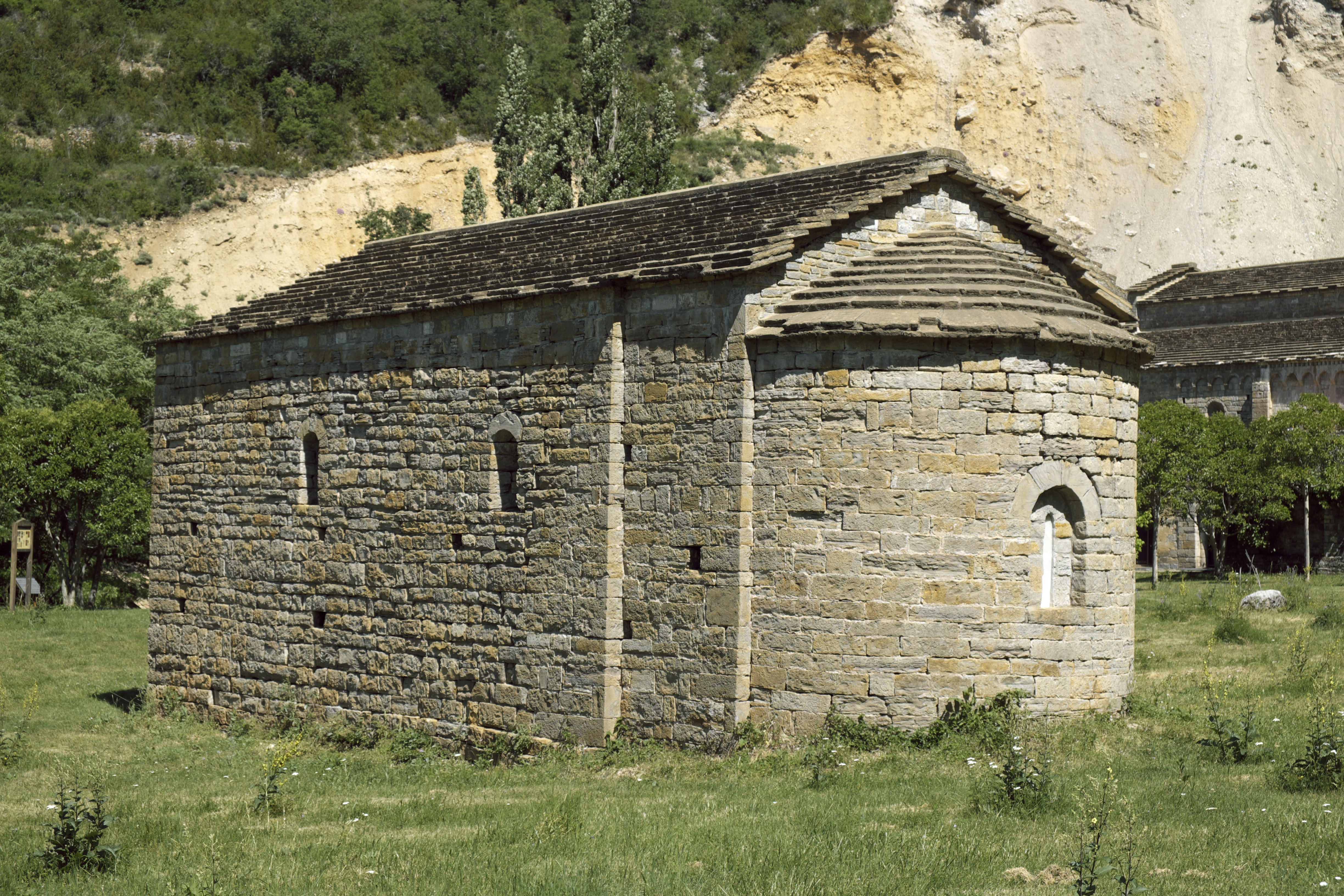 Ermita San Pablo des ehemaligen Benediktinerklosters Santa María de Obarra in Beranuy in der Provinz Huesca (Aragón/Spanien)